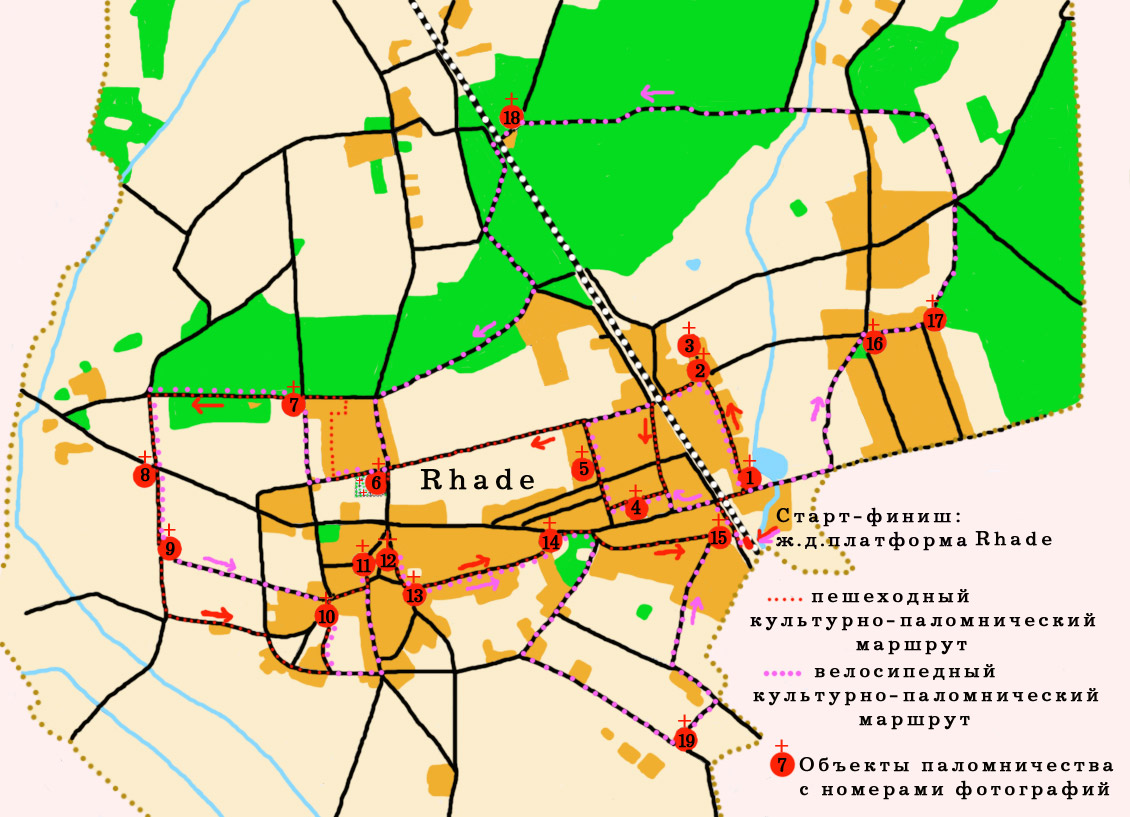 Karte für Pilgerfahrt. Dorsten-Rhade (de+rus.)